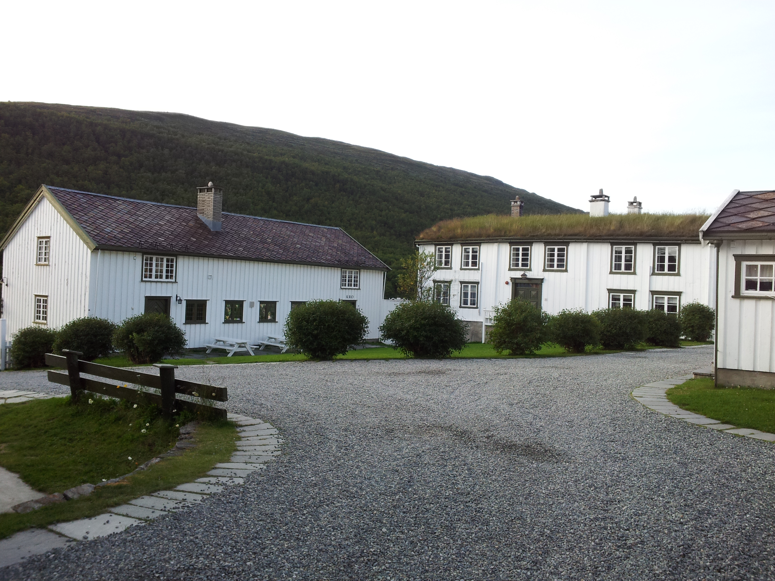 Kongsvold Fjeldstue. Fjellstue på Dovrefjell.